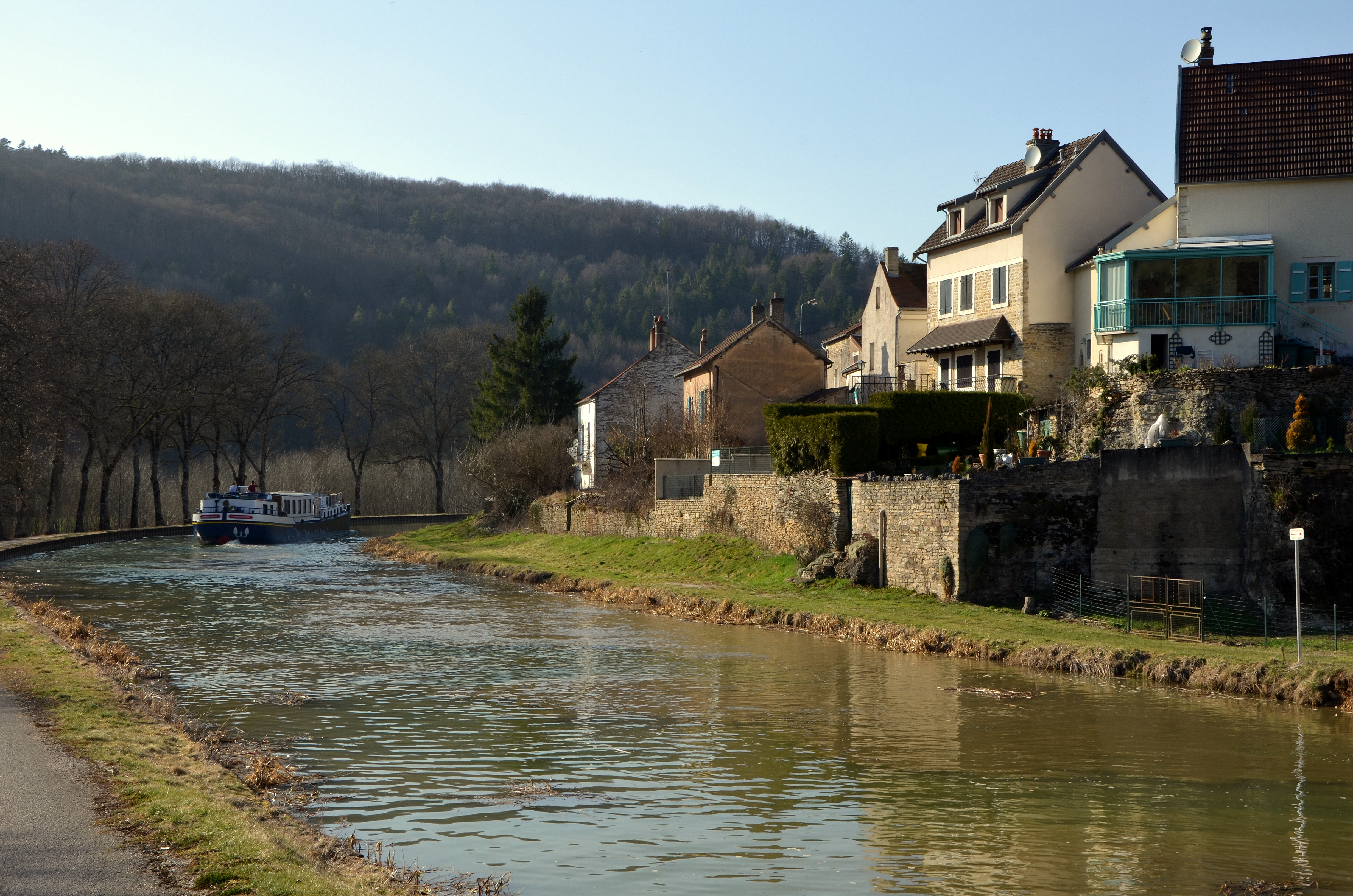 Canal de Bourgogne au niveau du hameau de La Forge, commune de la Bussière-sur-Ouche, Cote d'Or, Bourgogne, France